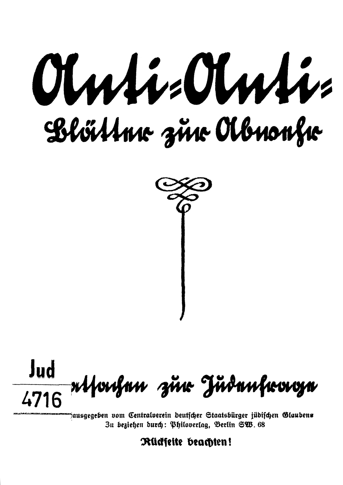 Anti-Anti-Blätter zur Abwehr : Tatsachen zur Judenfrage / hrsg. vom Centralverein deutscher Staatsbürger jüdischen Glaubens Berlin : Philoverlag 1924 Buchtitel